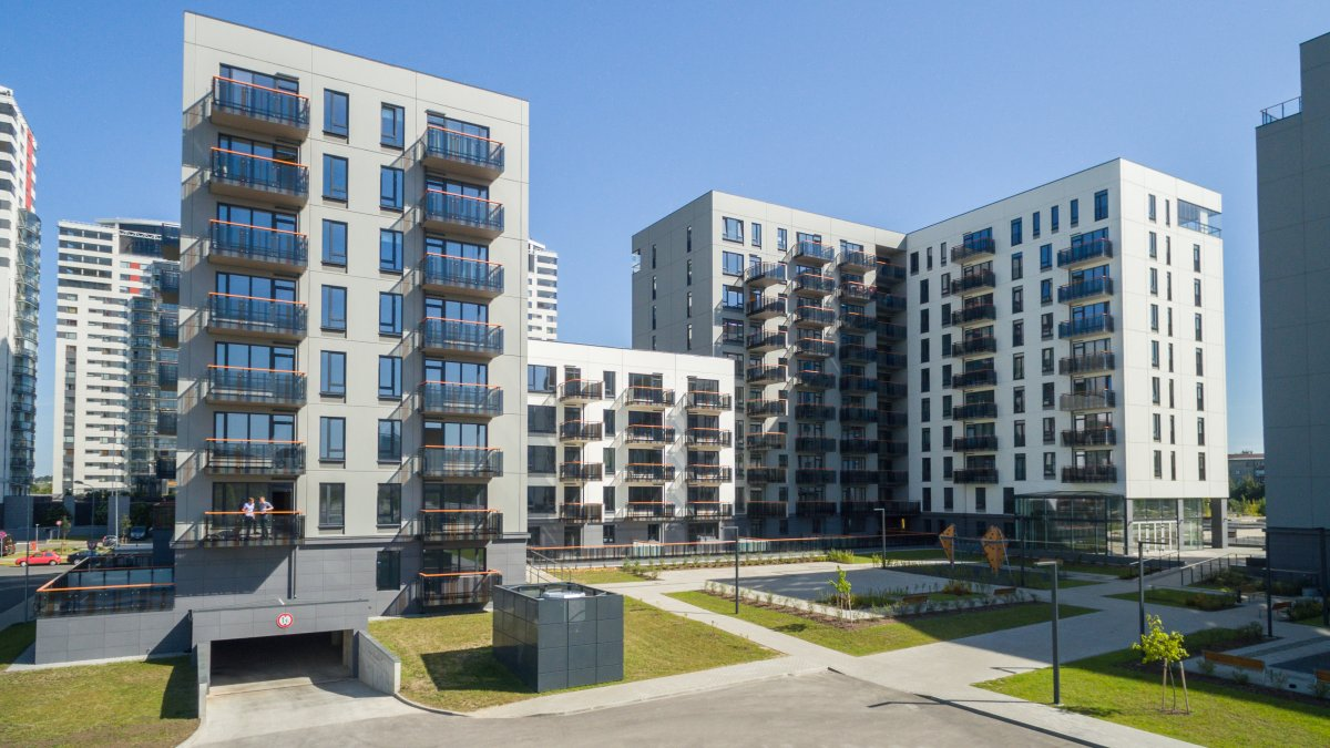 Skanstes mājas